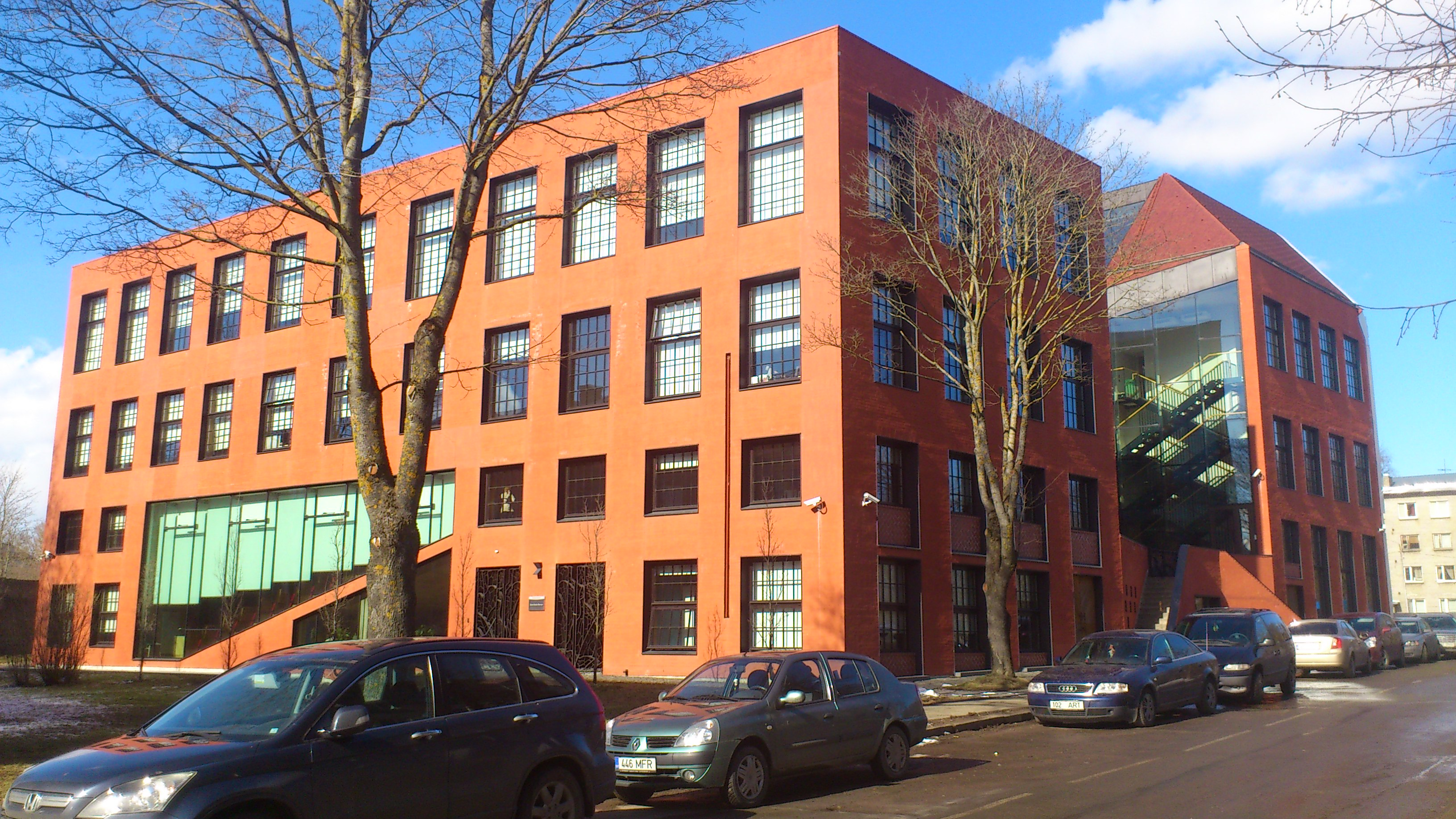 Tartu Ülikooli Narva Kolledž. Vaade Suurest tänavast